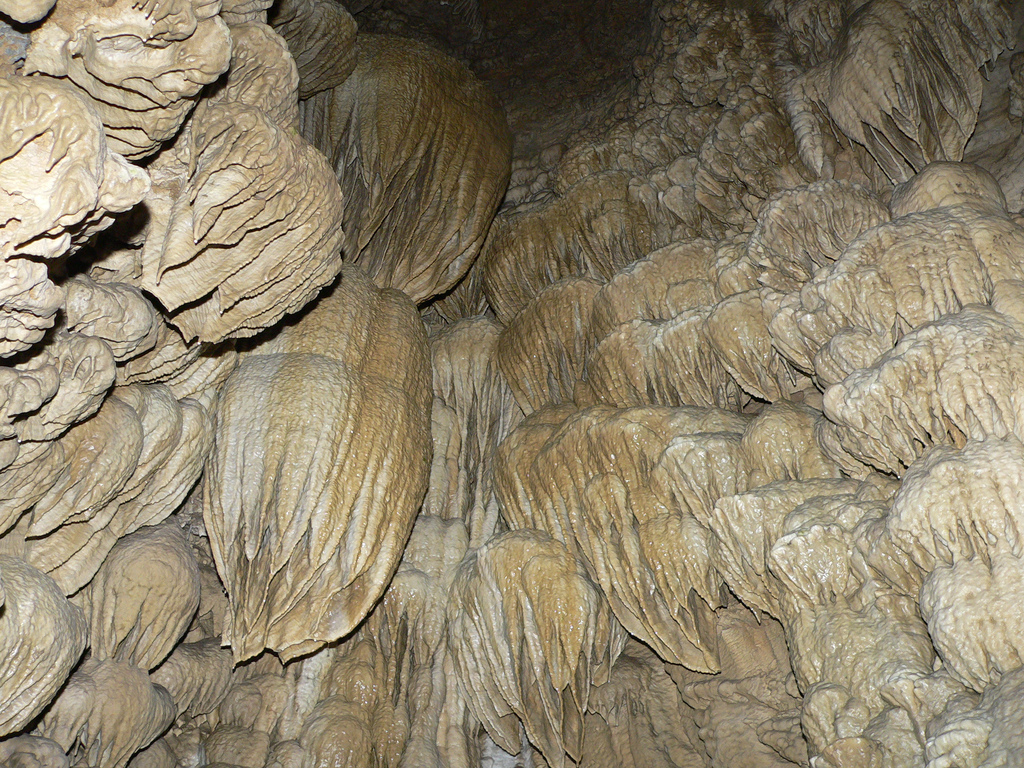 Oregon Caves